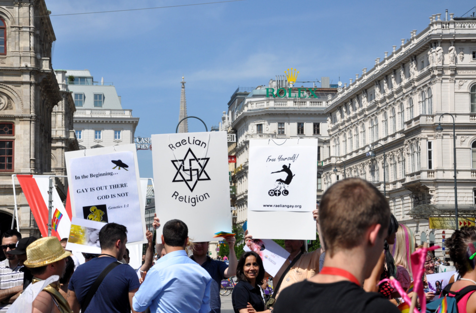 Regenbogenparade 2013 Wien (106)